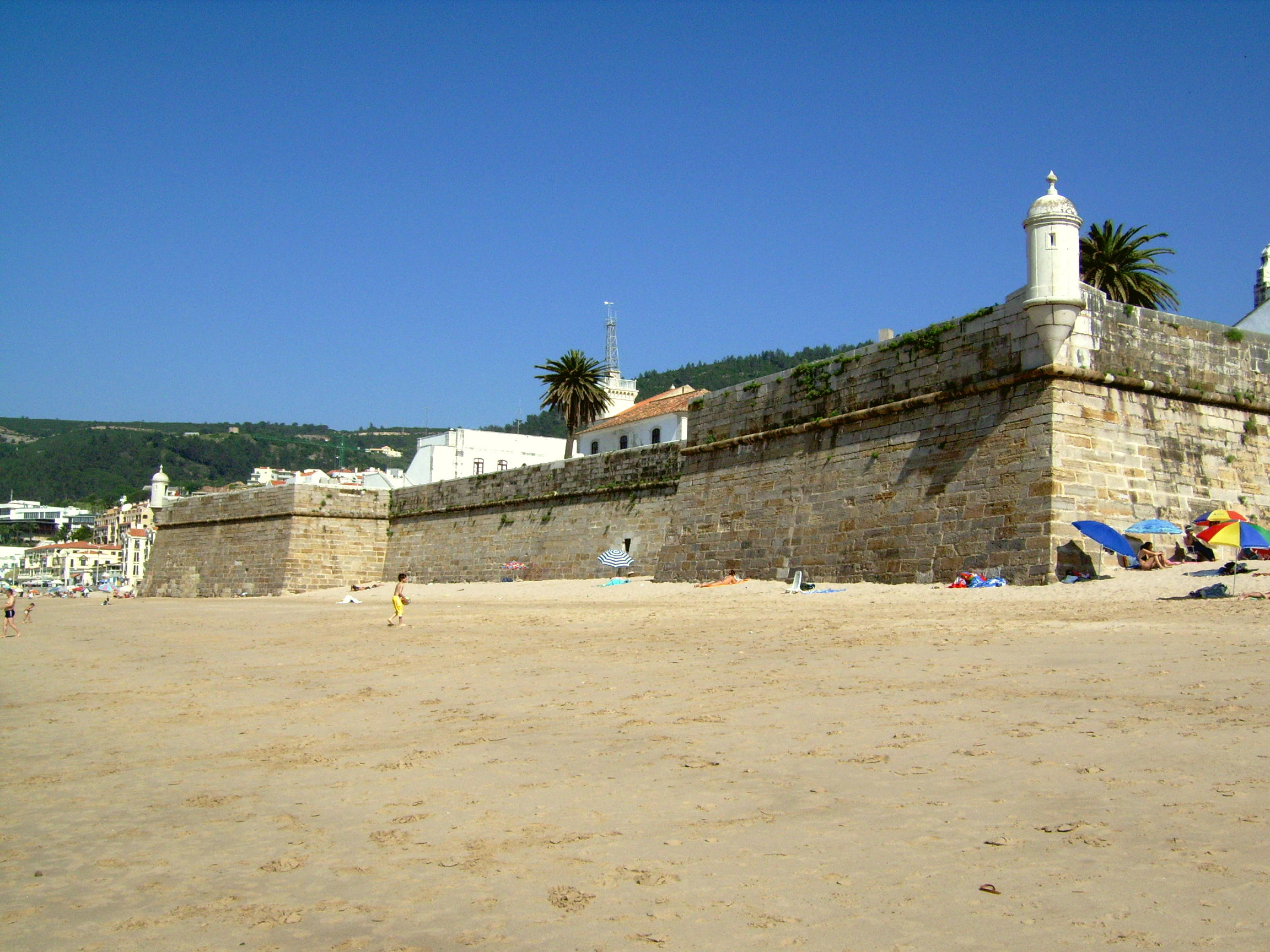 Fortaleza de Santiago user:sacavem (pt) (usuário:sacavem)